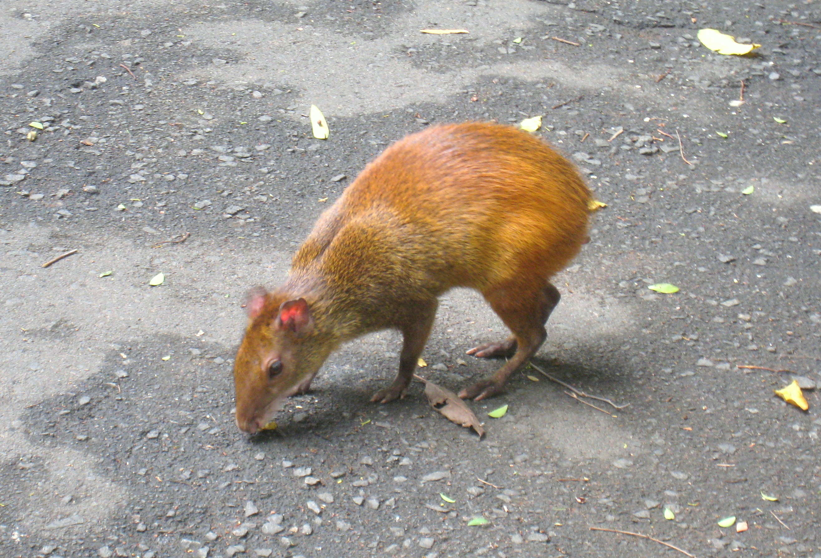 Bosque dos Jequitibás, Campinas, SP, Brazil.